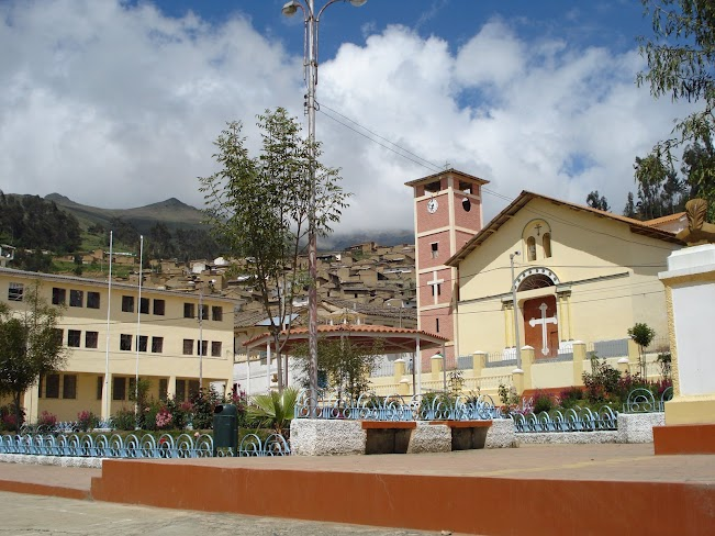 Plaza de armas de Aija